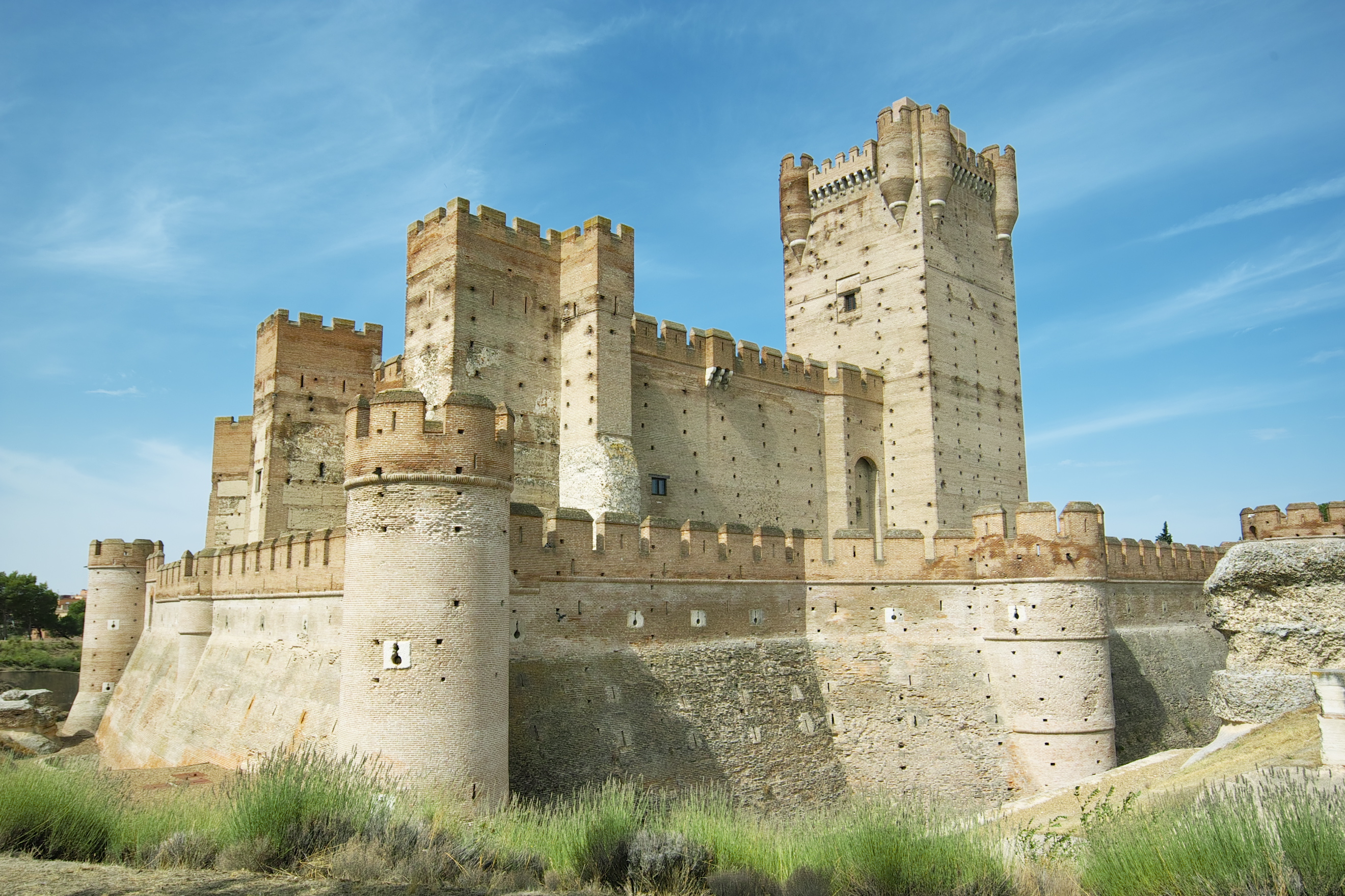 Vista general Castillo de la Mota (Medina del Campo)